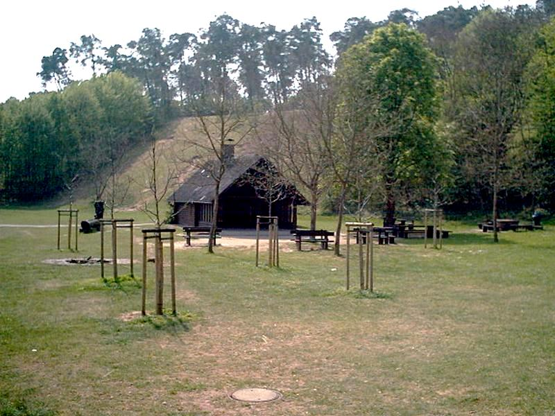 Grillhütte am Rande des Dünengebietes in Oftersheim/Kurpfalz